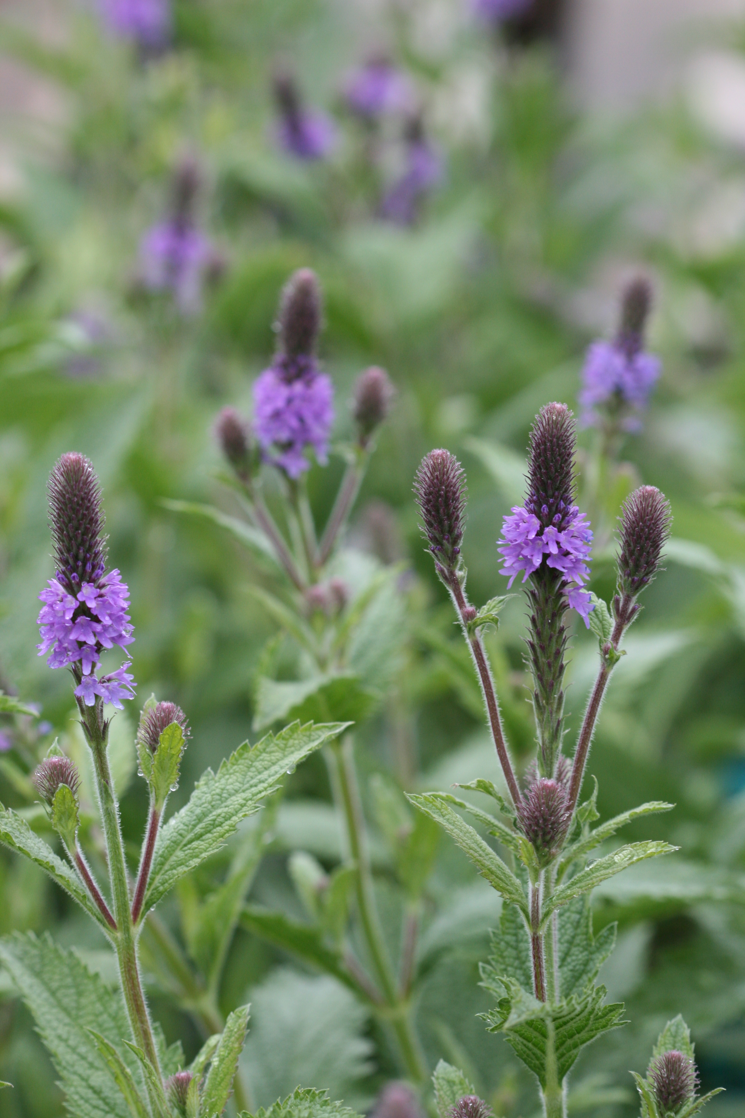 verbena macdougallii